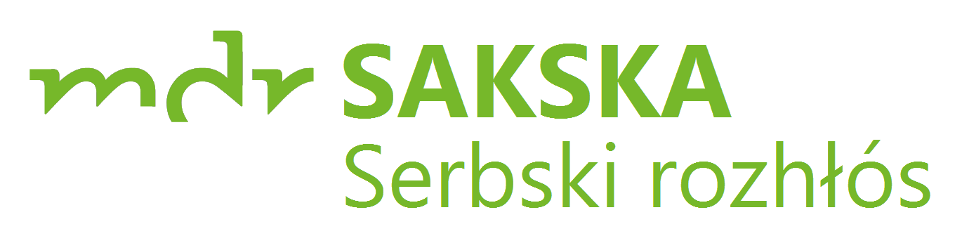 Logo von MDR Serbski rozhlos